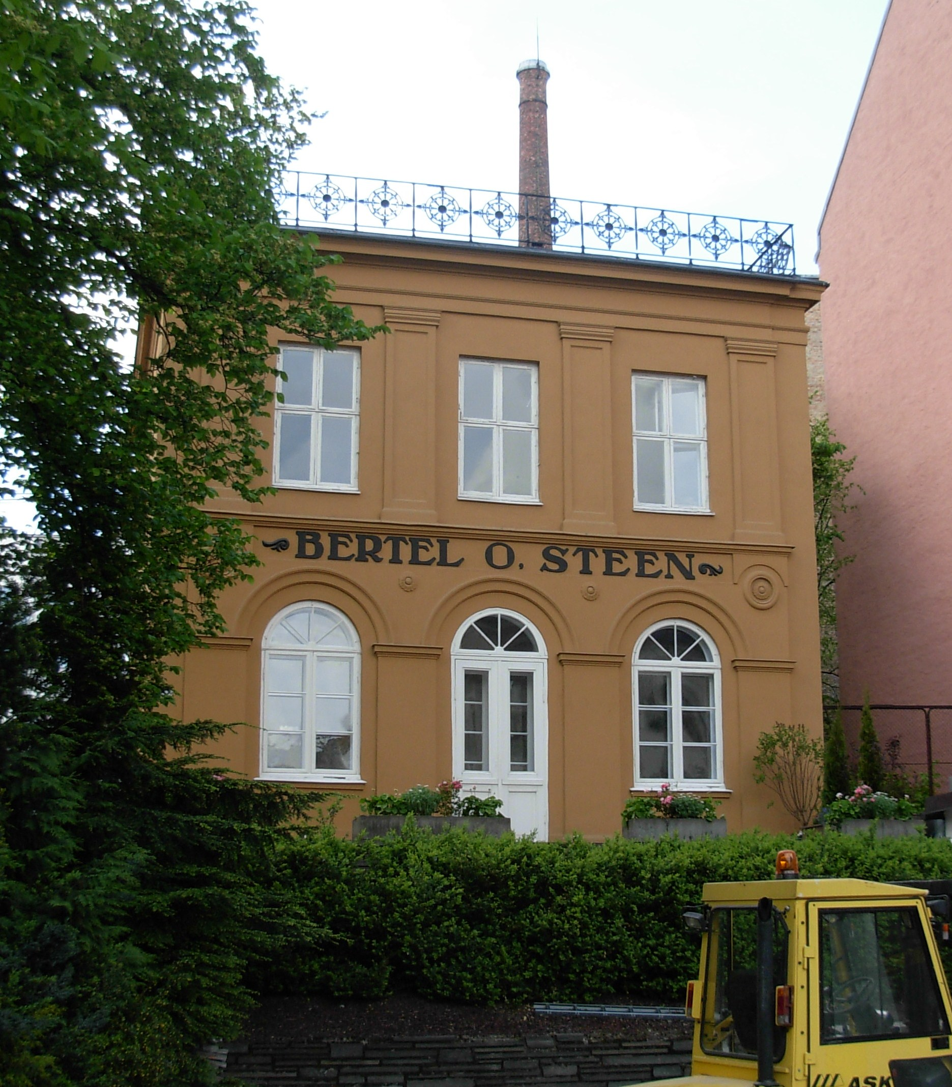 Parkveien 27, Bak Slottet, Oslo, oppført 1846-47, kalt Mysosten og Bertelosten (Bilfirmaet Bertel O. Steen holdt til her 1896-2007)